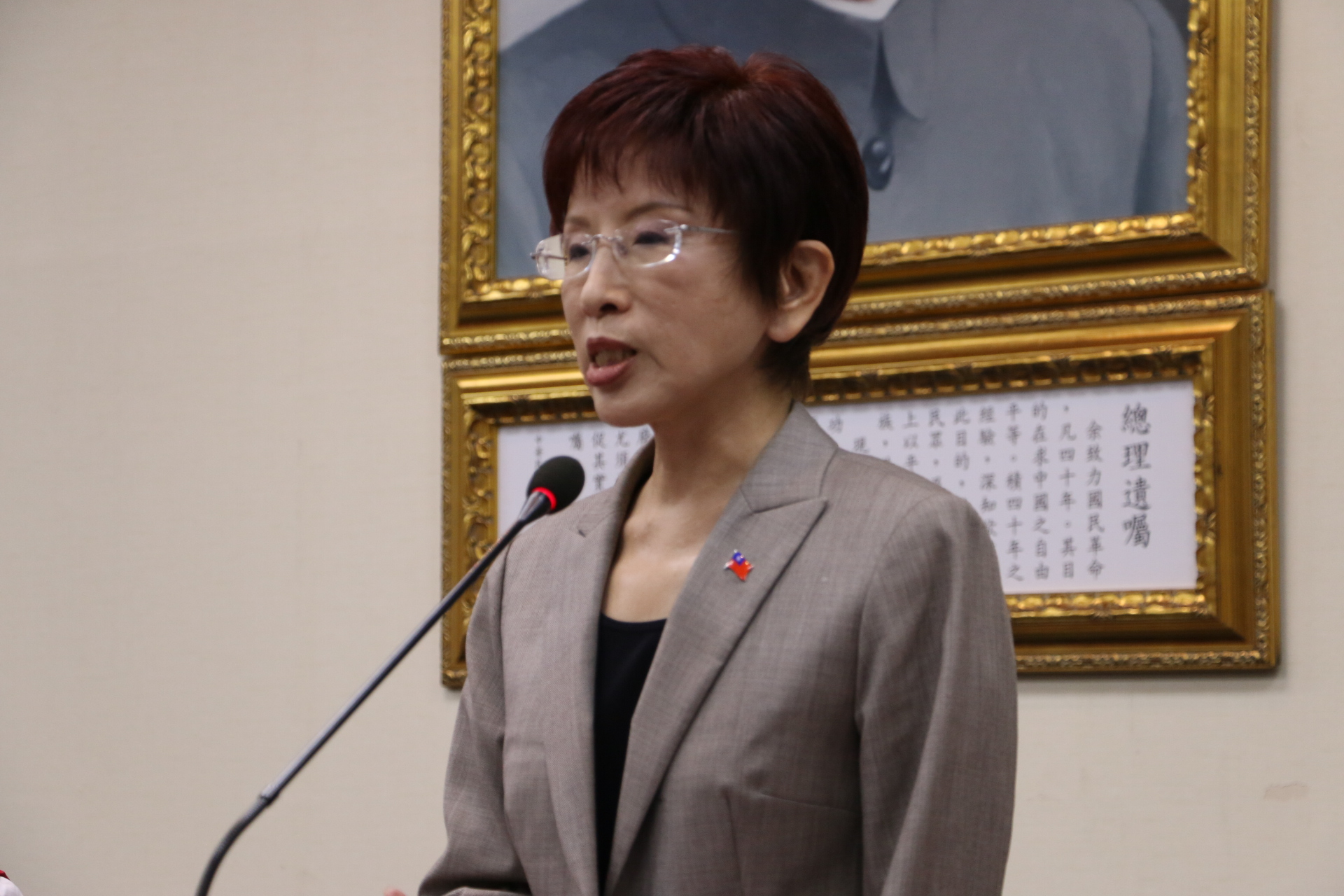 中文（台灣）: 國民黨總統候選人洪秀柱(美國之音楊明)